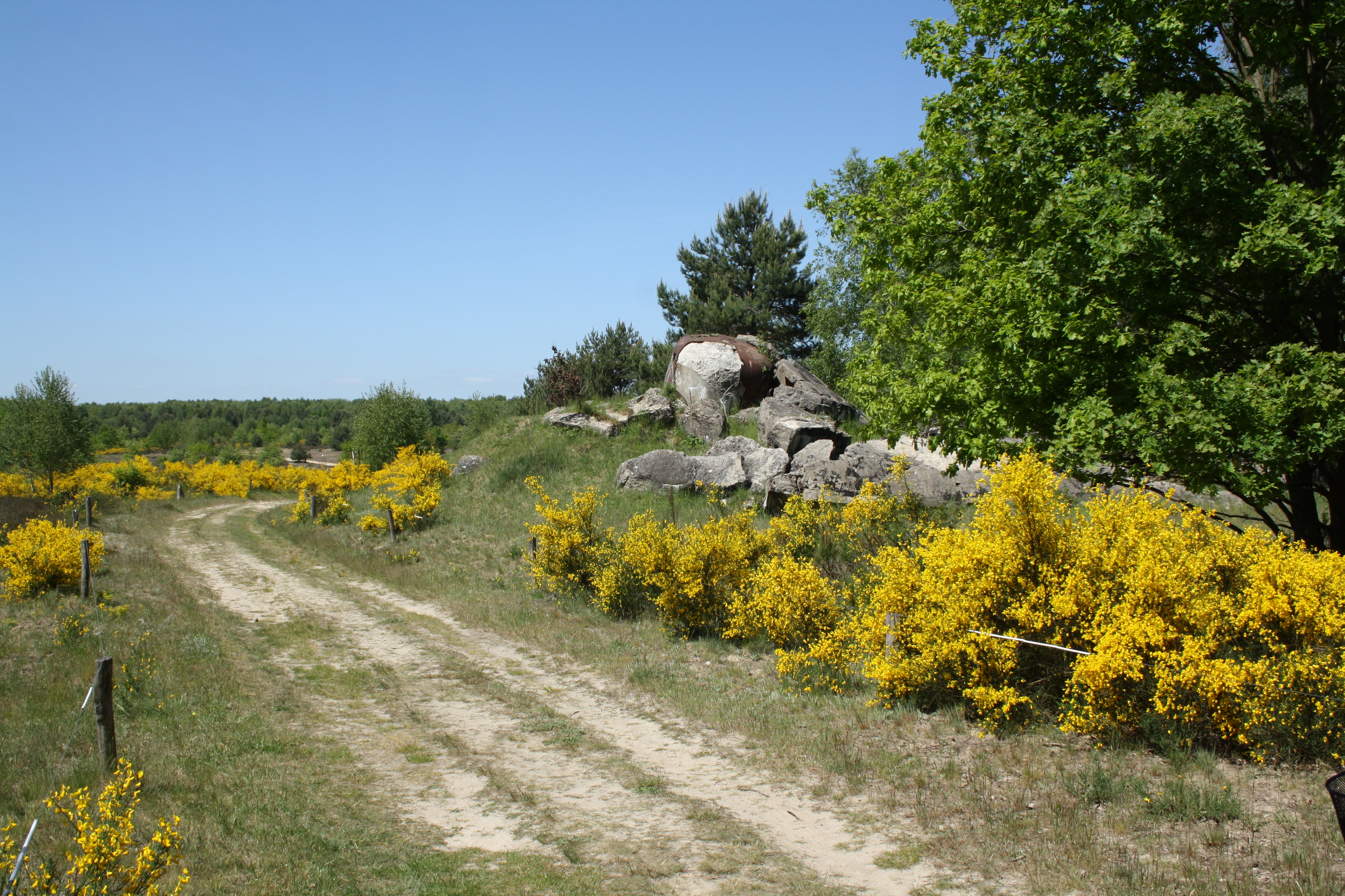 Anfang bis Mitte Mai blüht hier der Ginster prachtvoll im ehemaligen militärischen Gebiet. Zerstörte ehemalige Befehlsstelle / Bunker rechts des Weges.